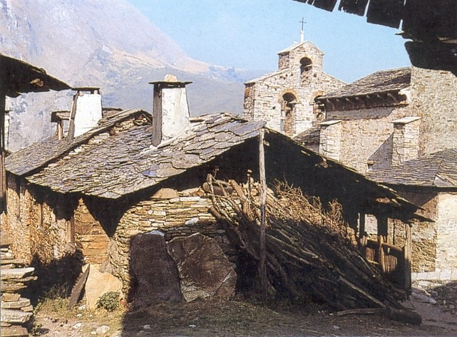 no original description